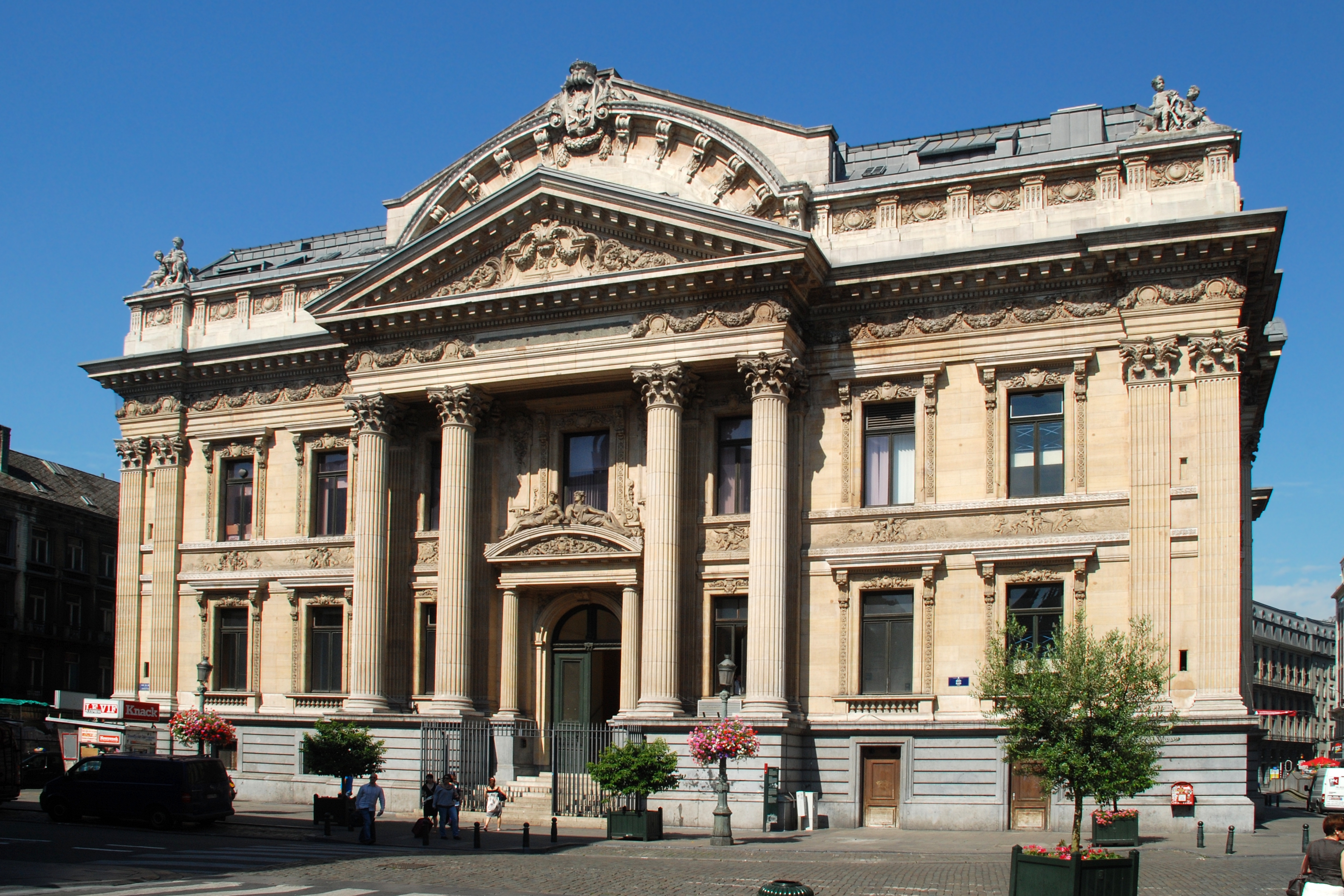 Belgique - Bruxelles - Bourse de Commerce et des Fonds Publics(façade arrière)(Léon Suys, 1872-1874)